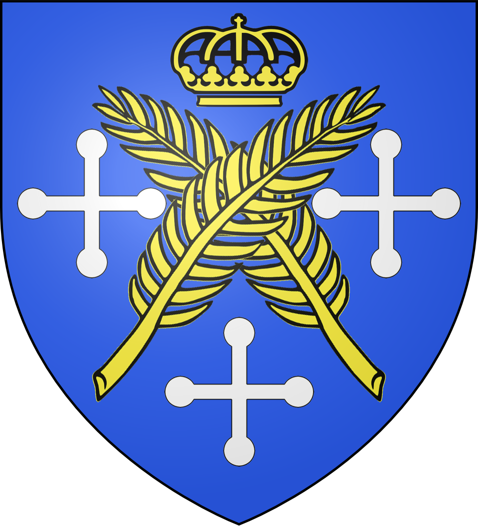 Blason de la ville de Saint-Étienne dans le département de la Loire (France) : d’azur aux deux palmes d’or passées en sautoir cantonné en chef d’une couronne royale fermée du même, aux flancs et en pointe de trois croisettes pommetées d'argent.